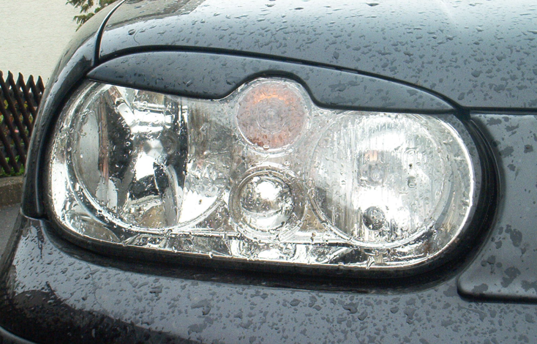 Scheinwerferblende eines 4er Golfs